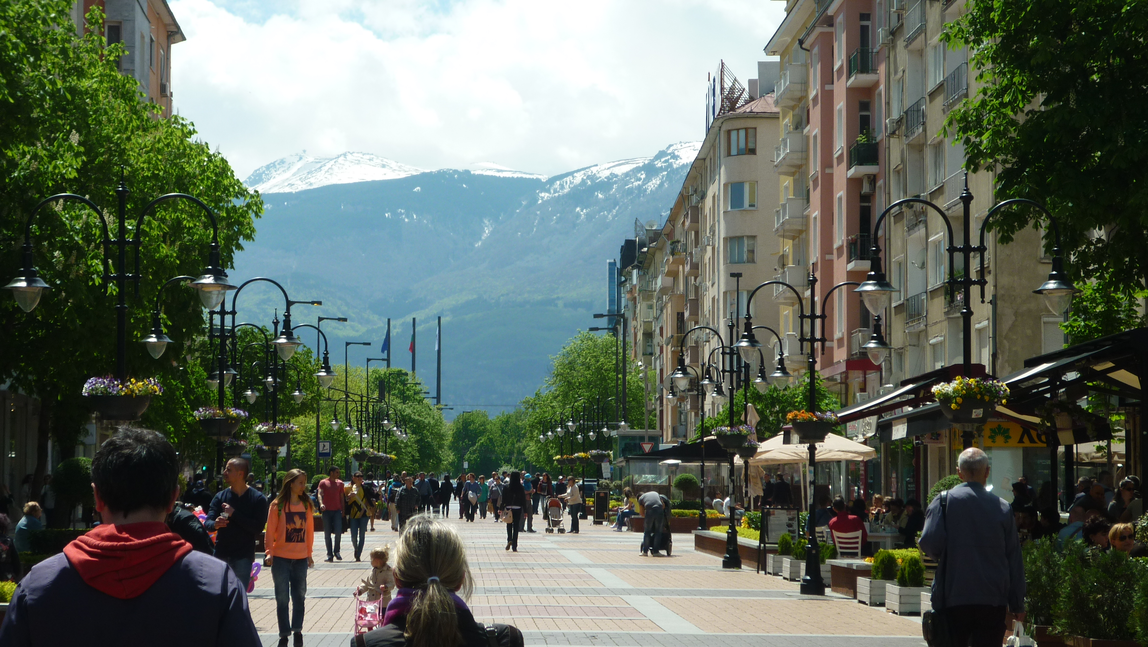 Снимка на бул. Витоша в София